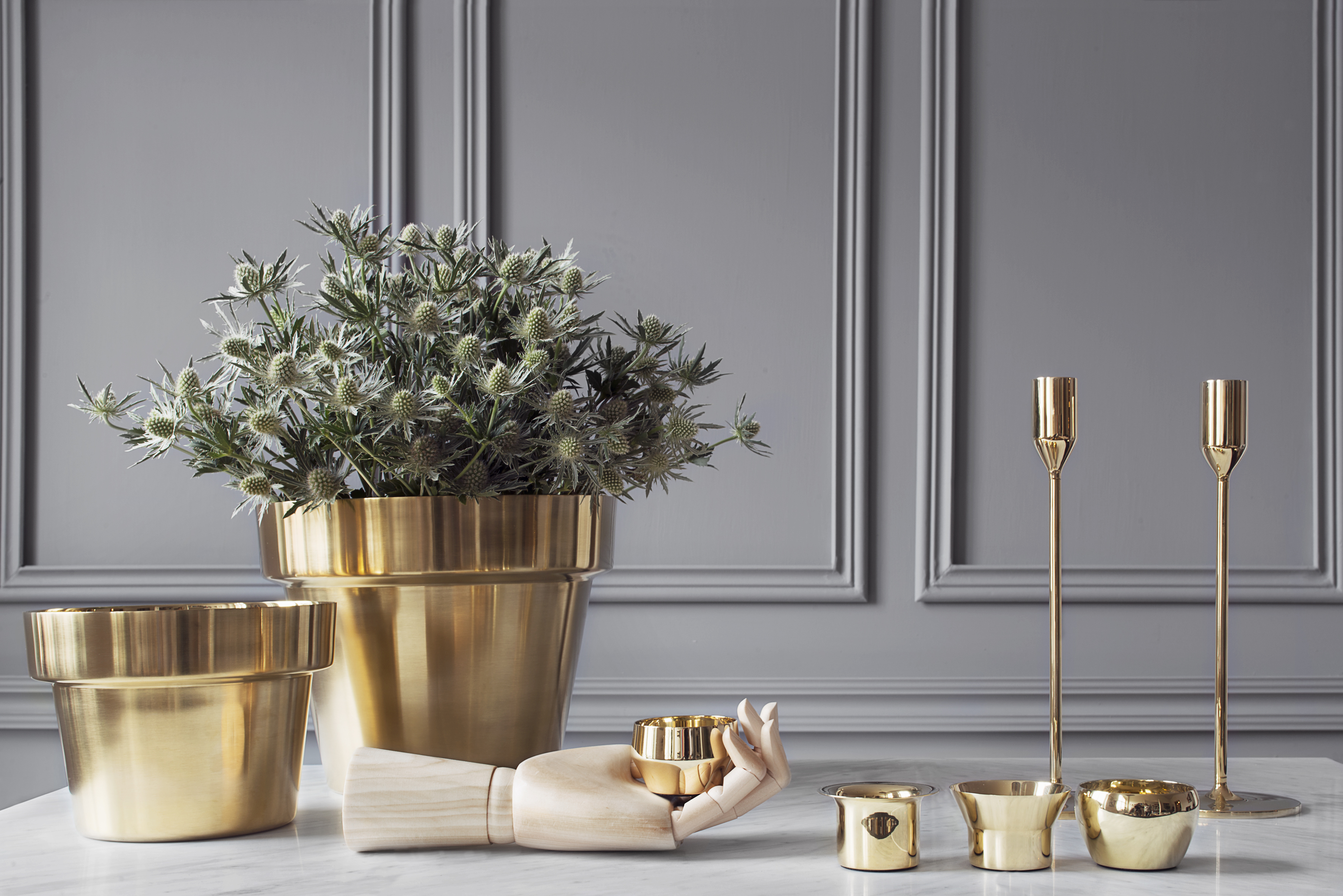 Exempel på nya produkter från Skultuna 1607